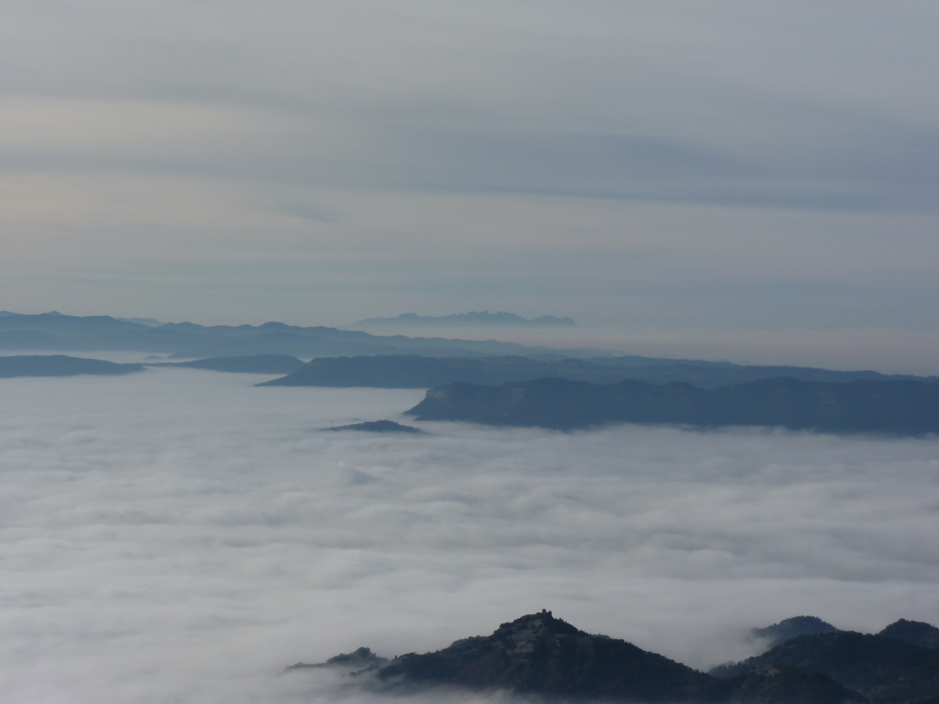 Boira a la plana de Vic. Montserrat al fons This is a a photo of a natural area in Catalonia, Spain, with id: ES510199